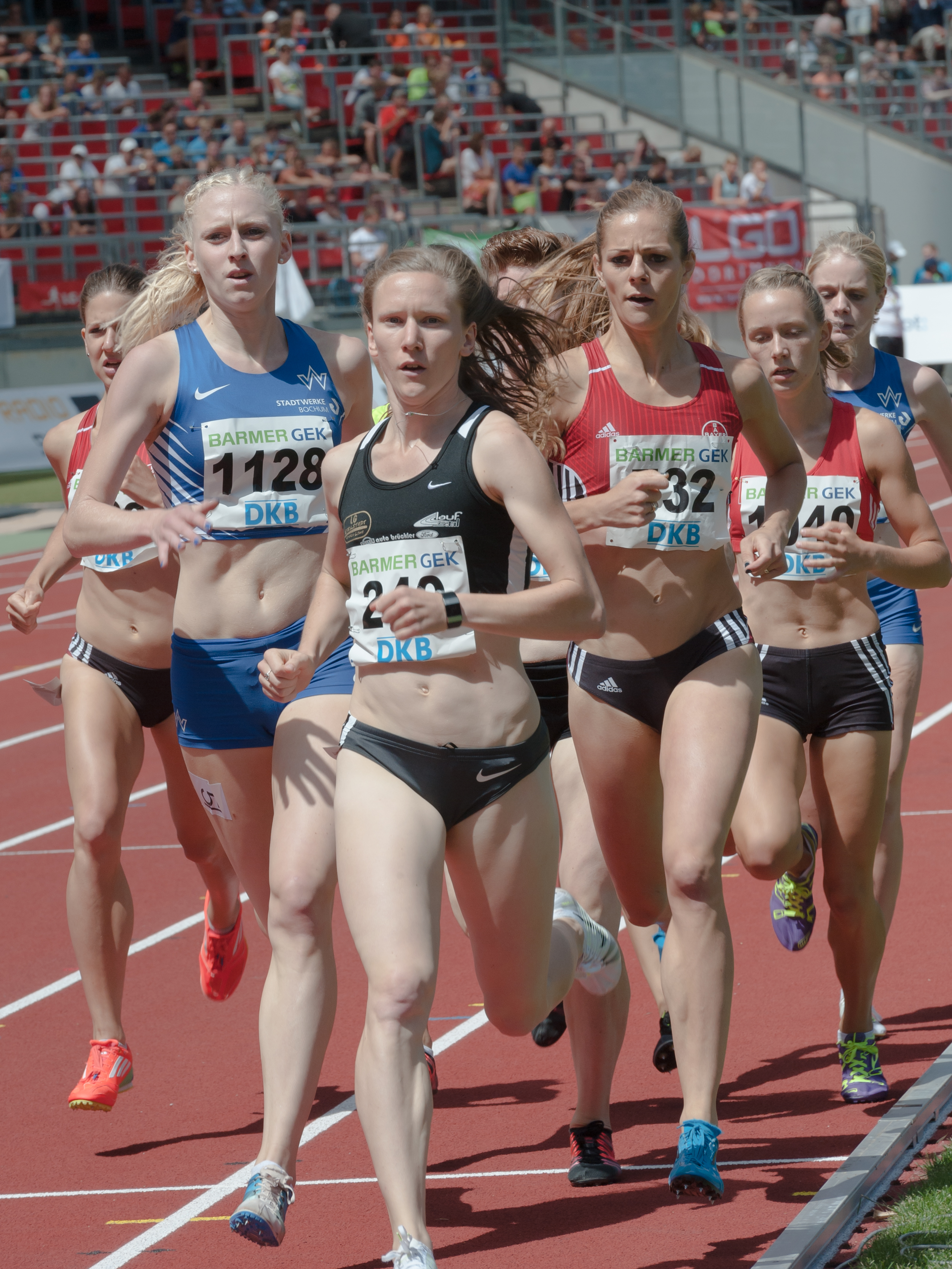 Deutsche Leichtathletik-Meisterschaften 2015: Frauen 800m - Fabienne Kohlmann